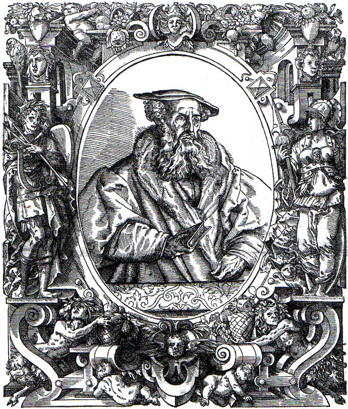 Heinrich Bullinger Holzschnitt 1570